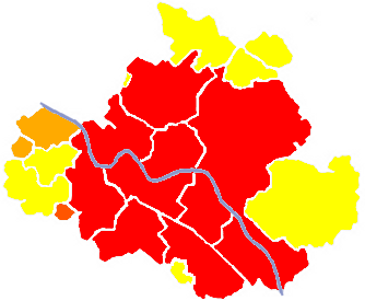 Eingemeindungen nach Dresden 1997-1999 rot: Stadtgebiet 1957-1997 Eingemeindungen: orangerot 1. Januar 1997, orange 1. Juli 1997, gelb 1. Januar 1999 selbsterstellt, auf der Grundlage von Bild:Dresden-ortsaemter.png von X5tr2d